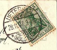 Poststempel des ehemaligen Postamtes in Uetersen aus dem Jahr 1907